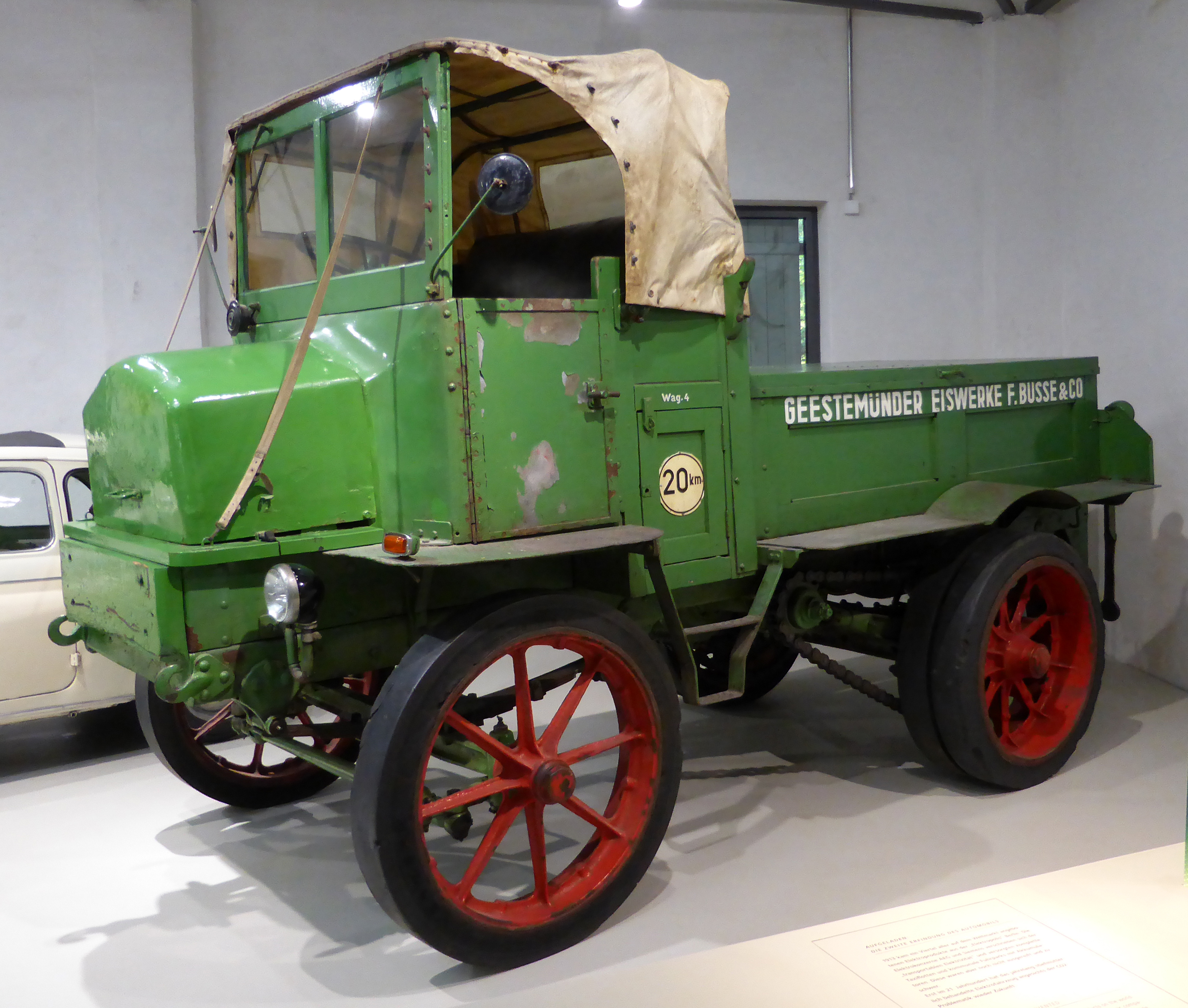 Hansa-Lloyd, Elektro-Schlepper, Baujahr 1935, Typ DL 5 (im Einsatz bis 1985 bei den Geestemünder Eiswerken, Bremerhaven). Ausgestellt im Deutschen Technikmuseum in Berlin. Wikipedianische KulTour am 10. Oktober 2015 in der Ausstellung des Museums.